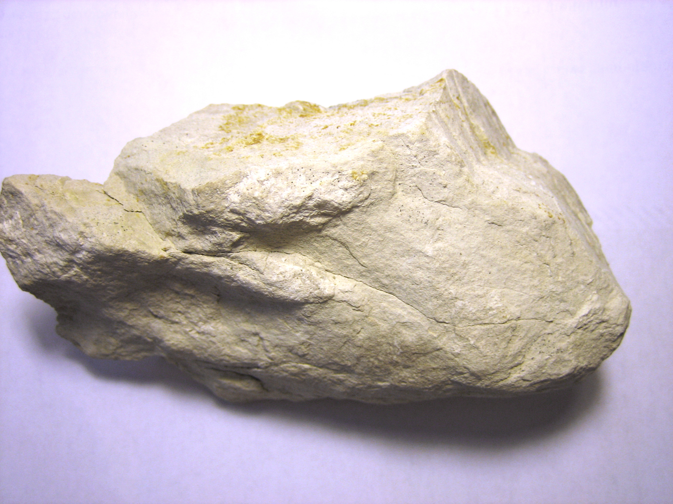 Opoka, Stoniškių karjeras